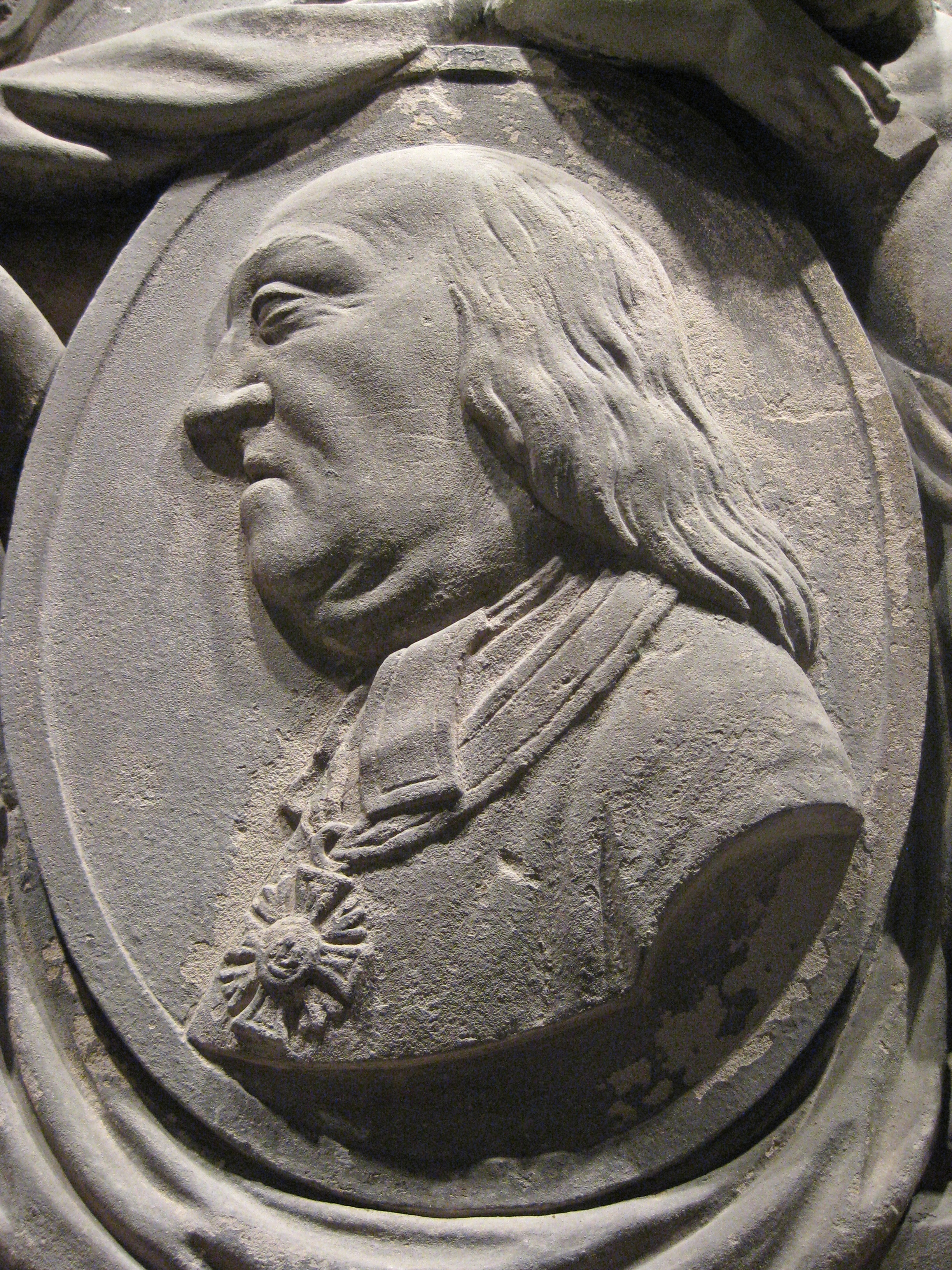 Portrait des Speyerer Domherrn Karl Joseph von Mirbach (1718-1798), von seinem Epitaph, Vinzentiushaus Bruchsal (ehemals Stadtkirche Bruchsal)